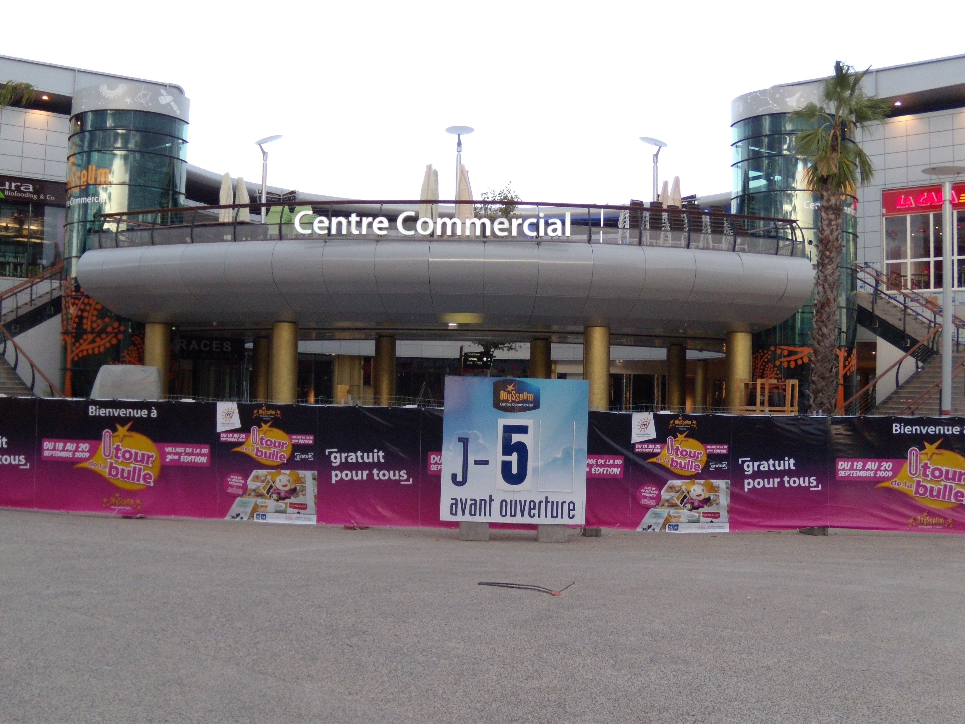 Devanture du centre commercial Odysseum 5 jours avant son ouverture.